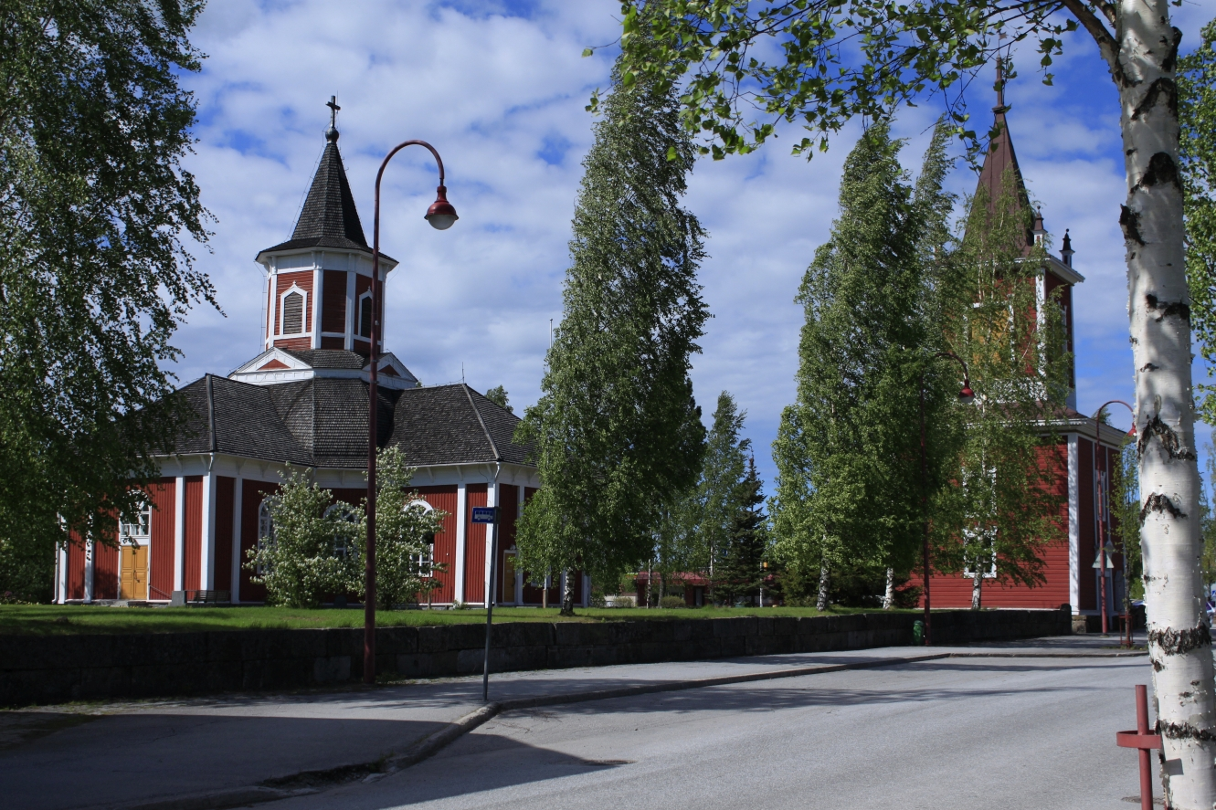 Kortesjärven kirkko ja tapuli